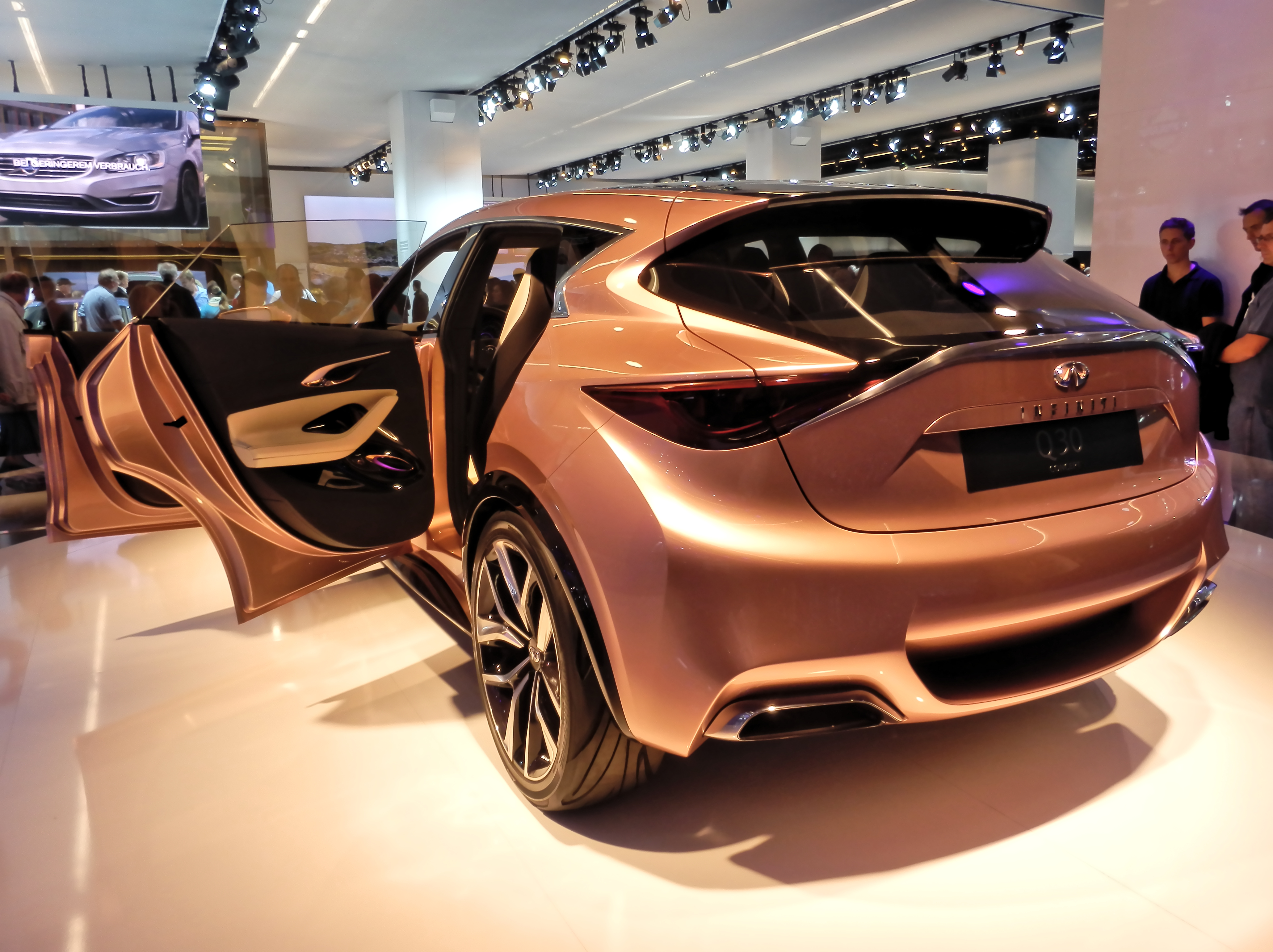 Infiniti Q30 Concept at IAA 2013